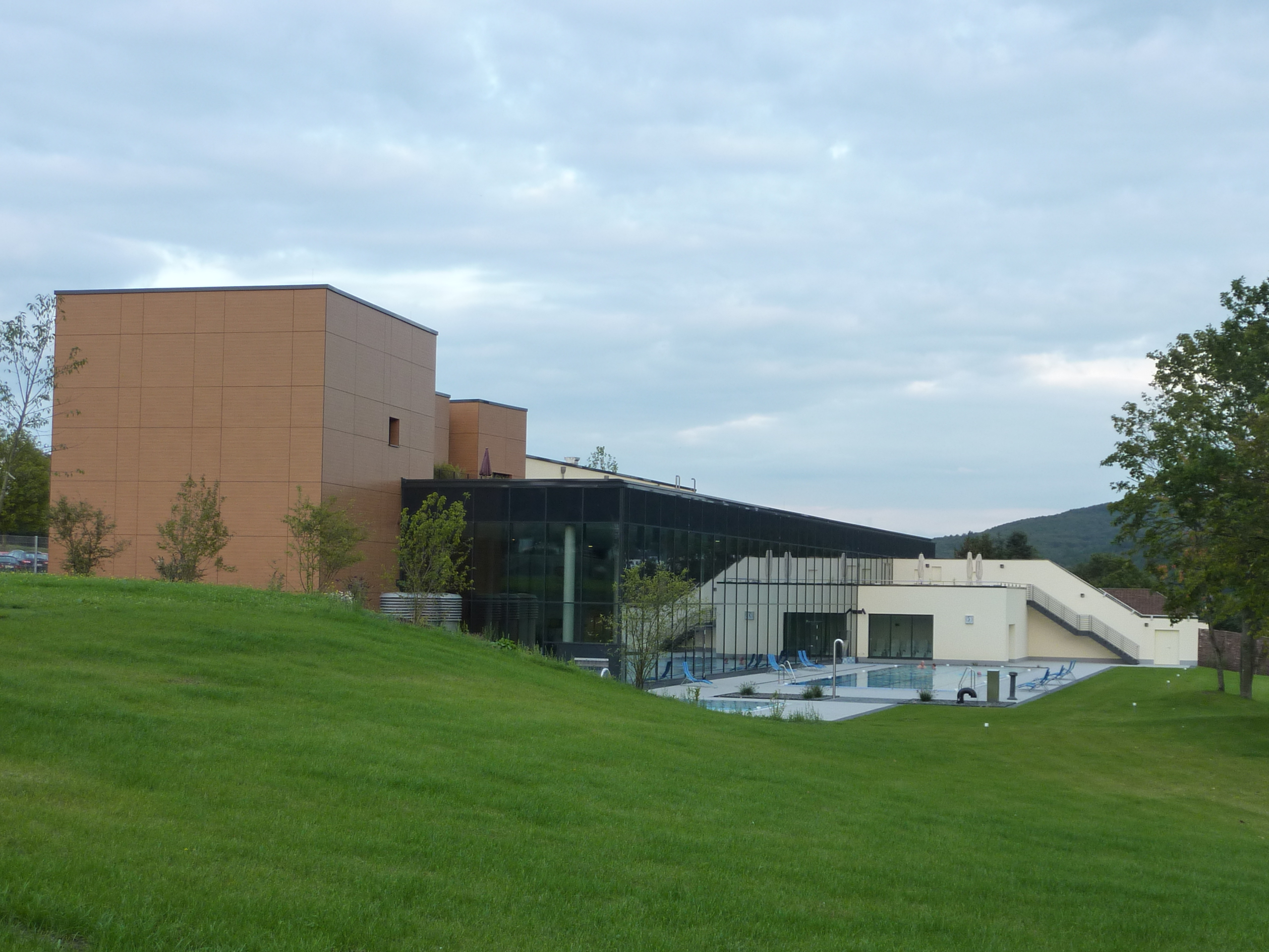 Gebäud der Lahn-Dill-Bergland-Therme in Bad Endbach von Süd-West gesehen